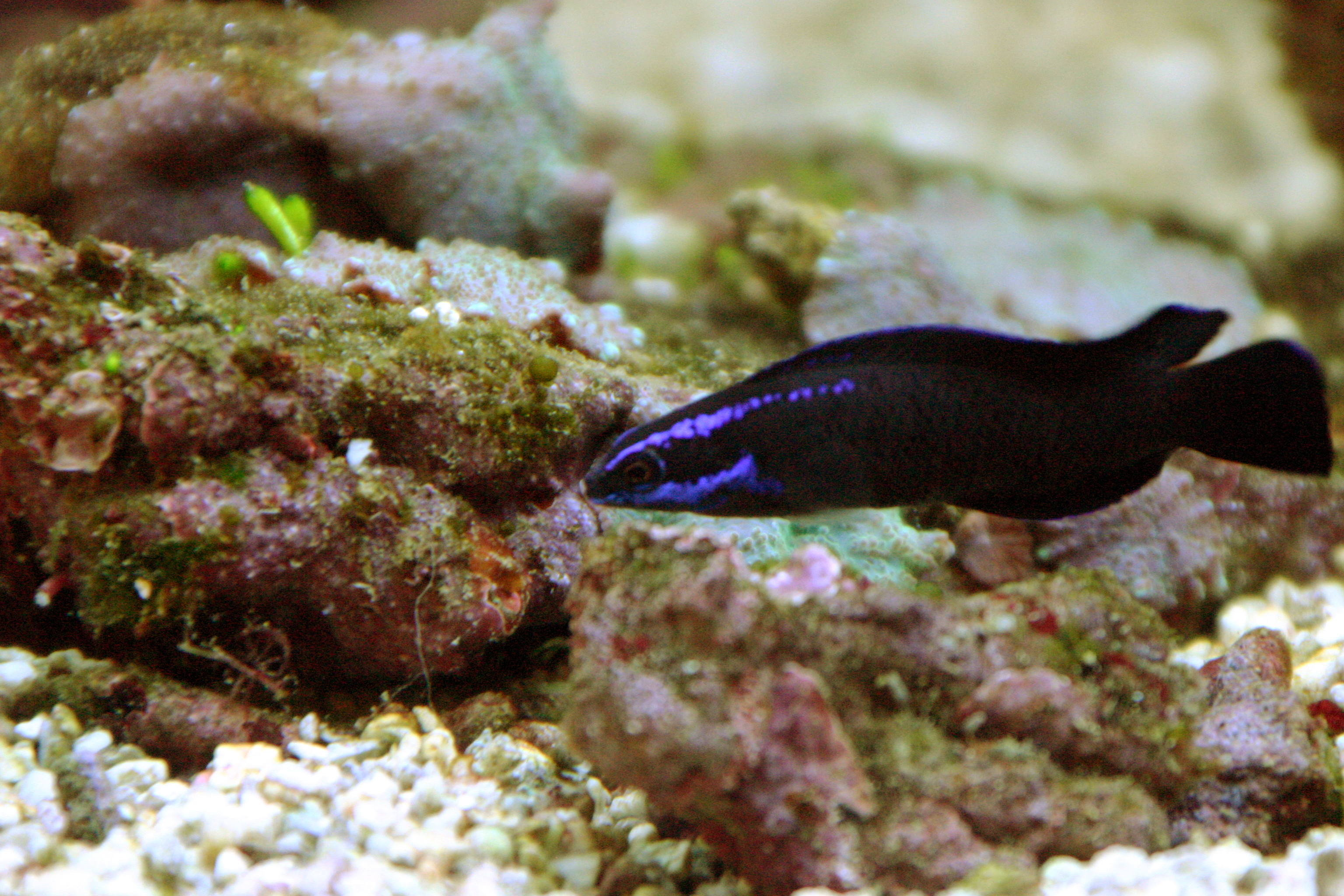 Pseudochromis springeri en acuario de arrecife